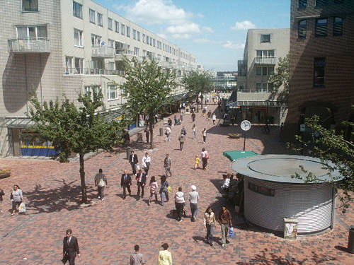 Winkelcentrum de Amsterdamse Poort, Amsterdam Zuidoost, the Netherlands